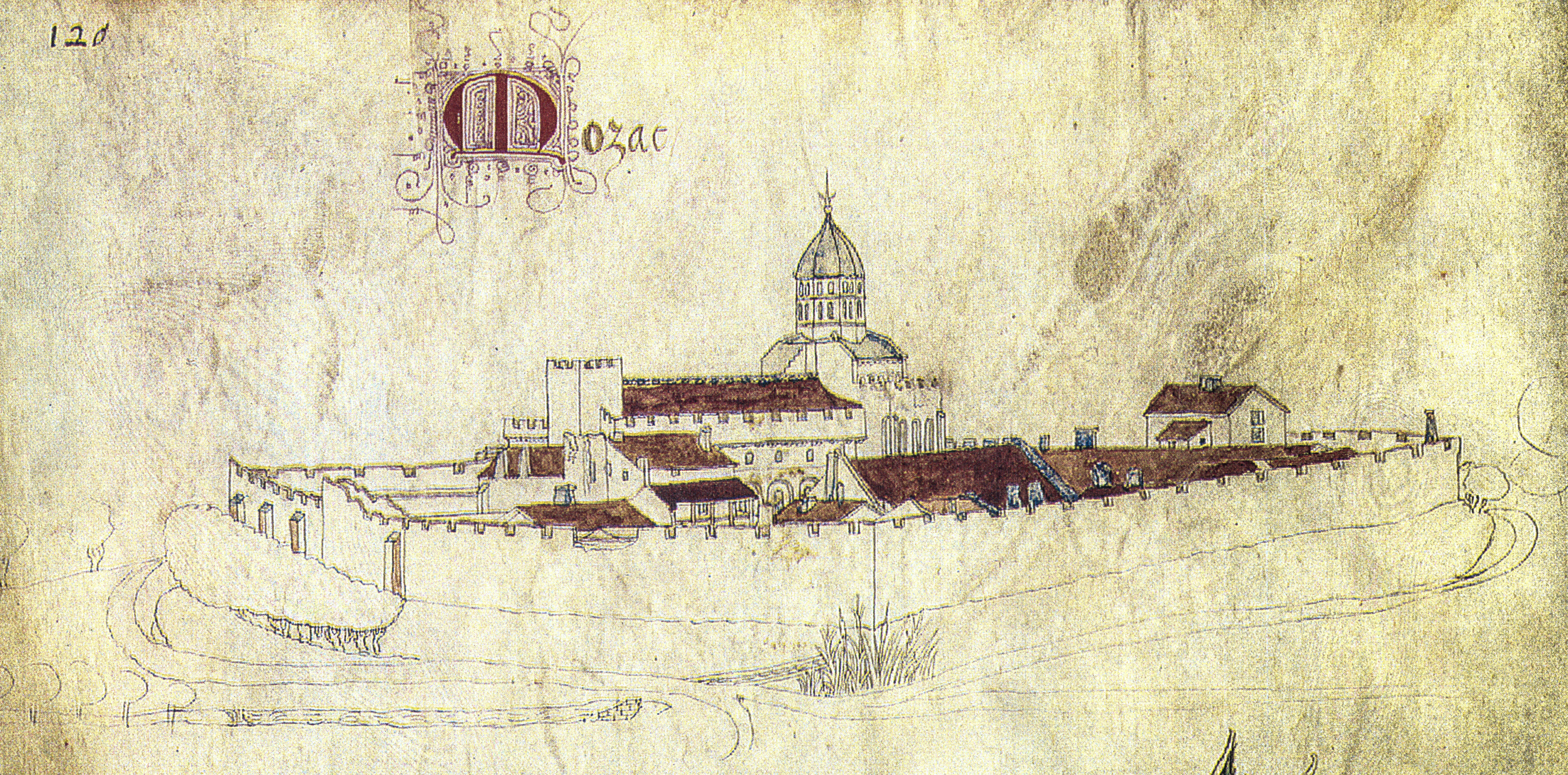 L'abbaye de Mozac, vue du sud-ouest, dessinée vers 1450 par Guillaume Revel pour son Armorial d'Auvergne.